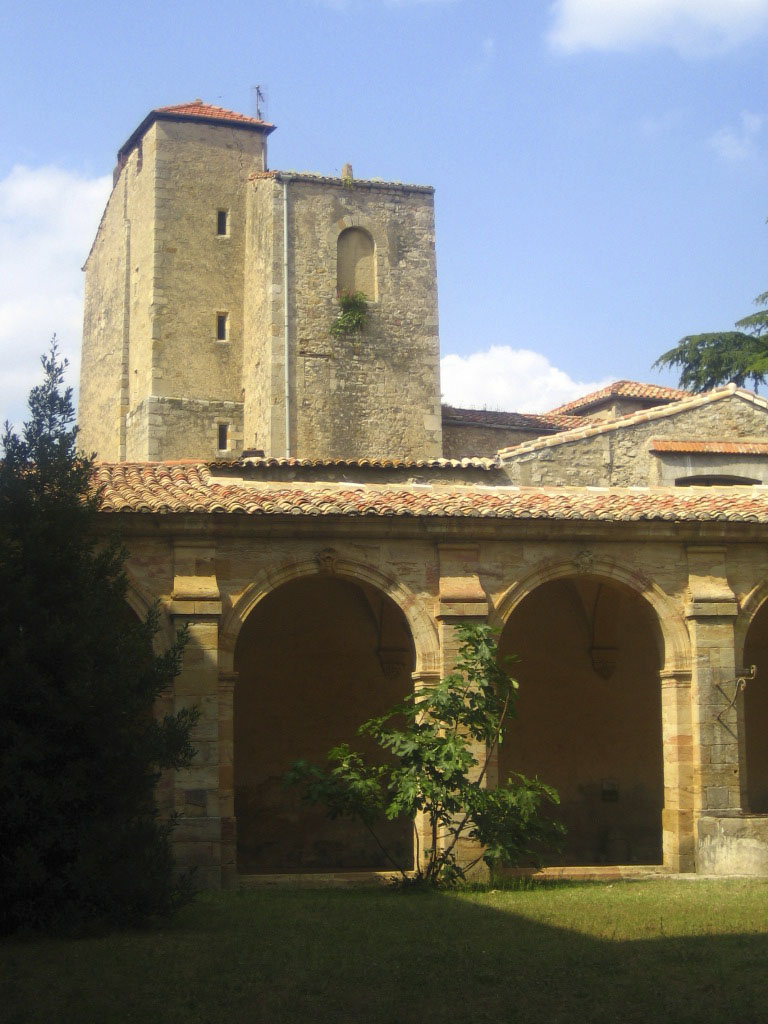 Ancienne tour et cloître de l'abbaye Sainte-Marie d'Orbieu de Lagrasse (Aude)